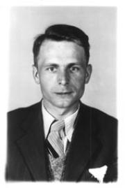 Ludwig Cyranek (1907–1941), kierował powielaniem i dystrybucją literatury biblijnej w Niemczech w czasie III Rzeszy